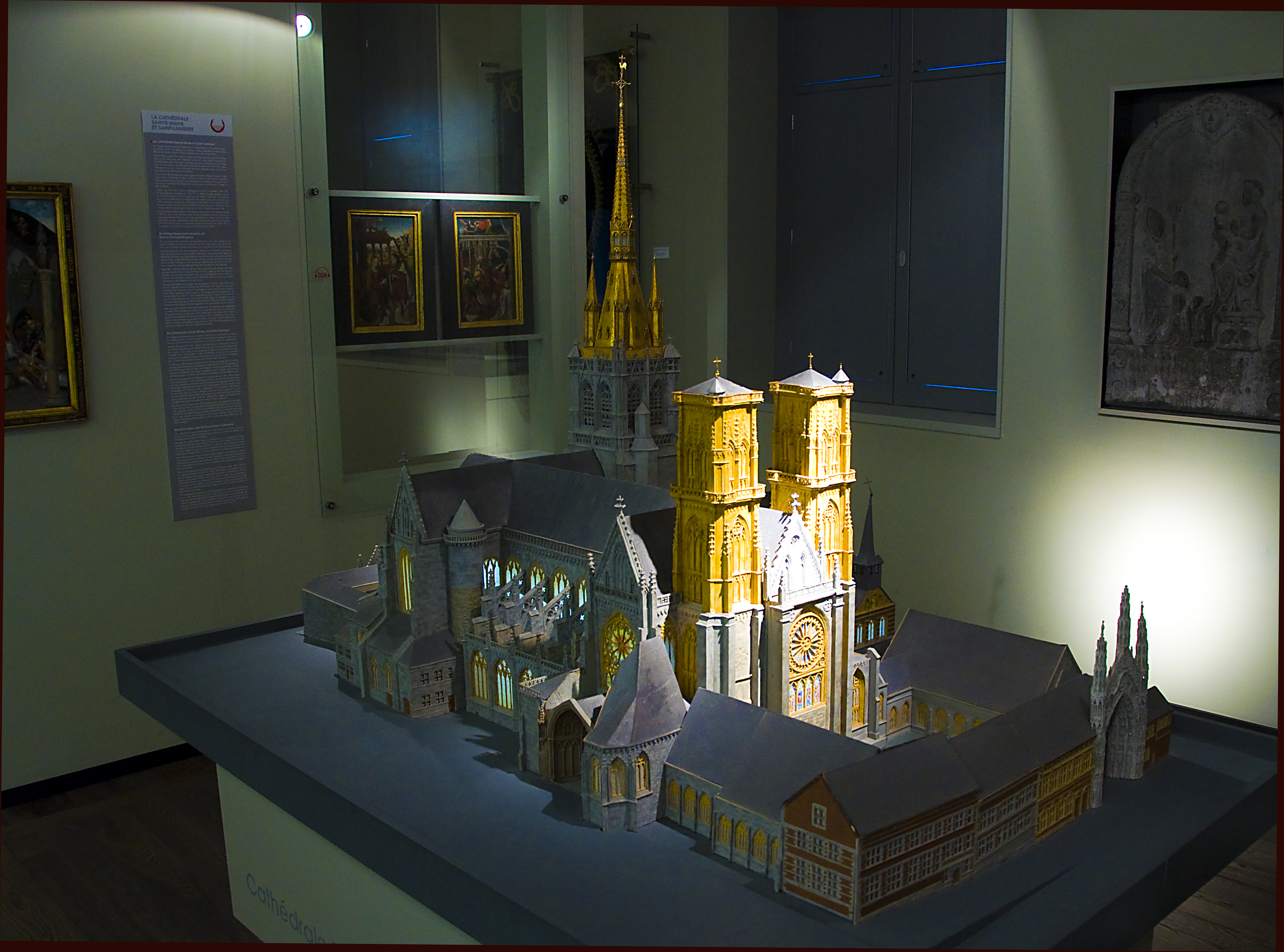 Schaalmodel van de intussen verdwenen Sint-Lambertuskathedraal van Luik in het Grand Curtius te Luik, België